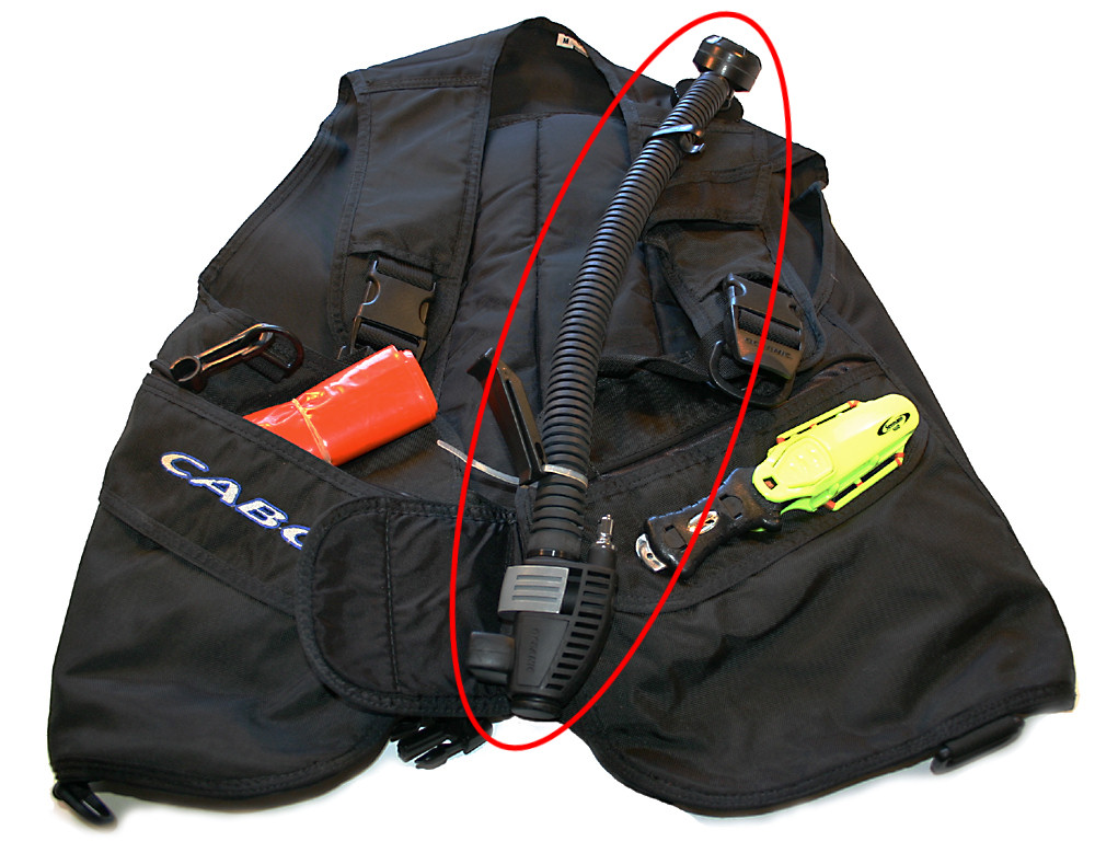 Buoyancy compensator, particular.